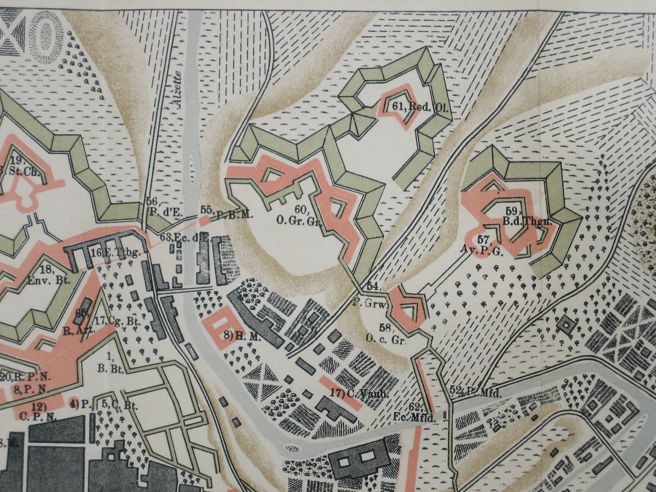 D'Gréngewald-Front vun der Festung Lëtzebuerg, 1794; Ausschnëtt aus der Kaart vum A, Lefort. Legend: "57, Av. P.Gr." = Avancée de Petit-Grunewald (Fort Obergrünewald) "58, O. c. Gr." = Ouvrage à corne de Grunewald "59, B.d.Thgn" = Bastion de Thüngen "60, O. Gr.Gr." = Ouvrage de Grand-Grunewald (Fort Niedergrünewald) "61, Red. Ol." = Redoute Olizy